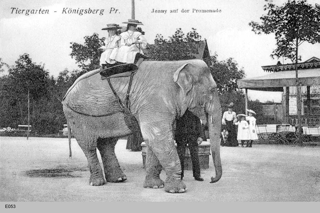 Tiergarten Königsberg